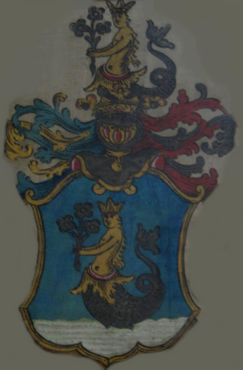 Blason de Mária Wesselényi de 1785 en l'Église réformée de "Ulița Lupilor" (Farkas utcai református templom), Cluj-Napoca/Kolozsvár, România